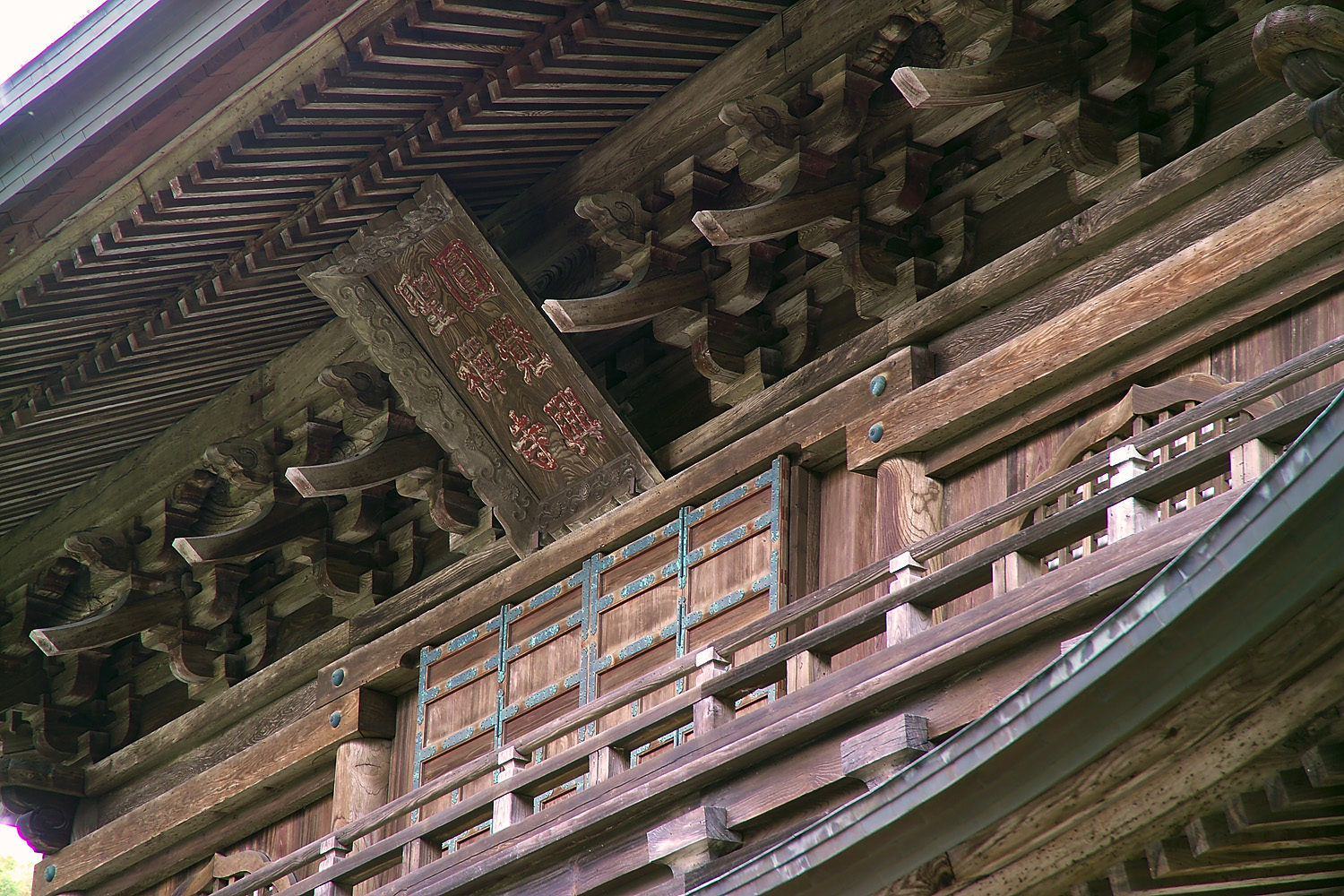 Gate (sanmon) at Engaku-ji in Kamakura, Japan 鎌倉円覚寺の山門